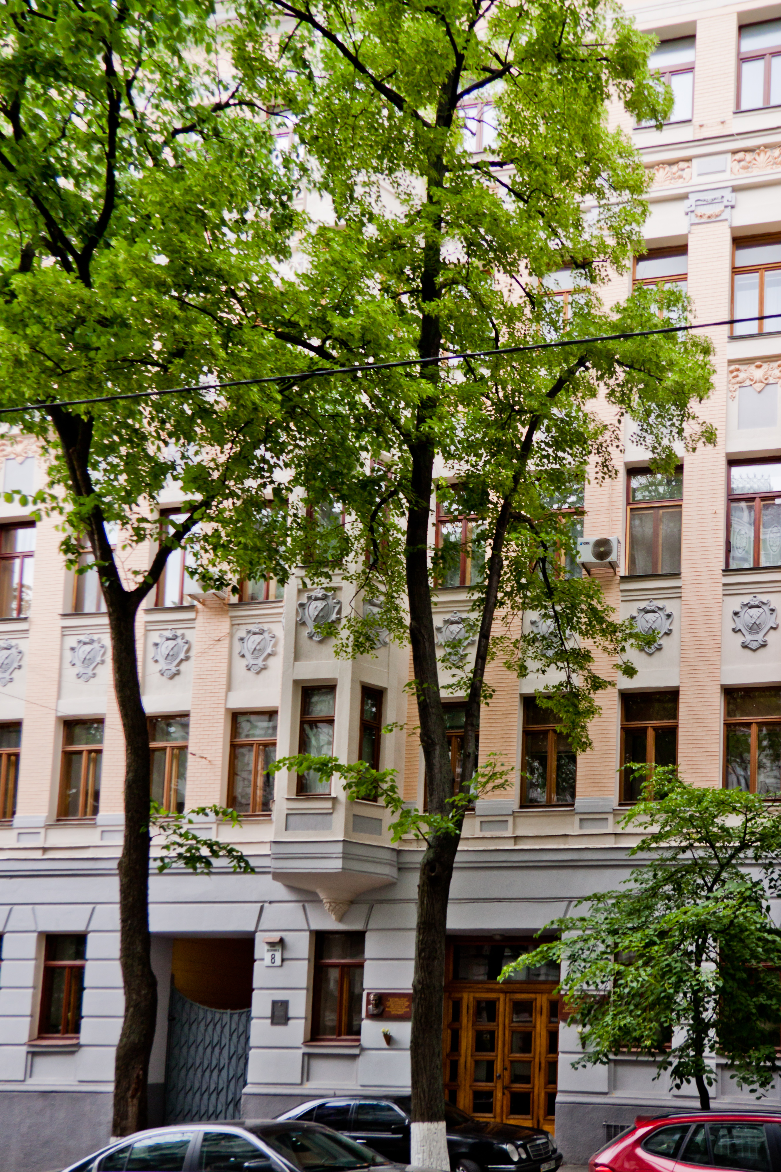 Доходный дом сахарозаводчика семьи сахарозаводчика и французского консульского представителя Даниила Балаховского в Киеве (ул. Трёхсвятительская, 24, ныне Десятинная,8).